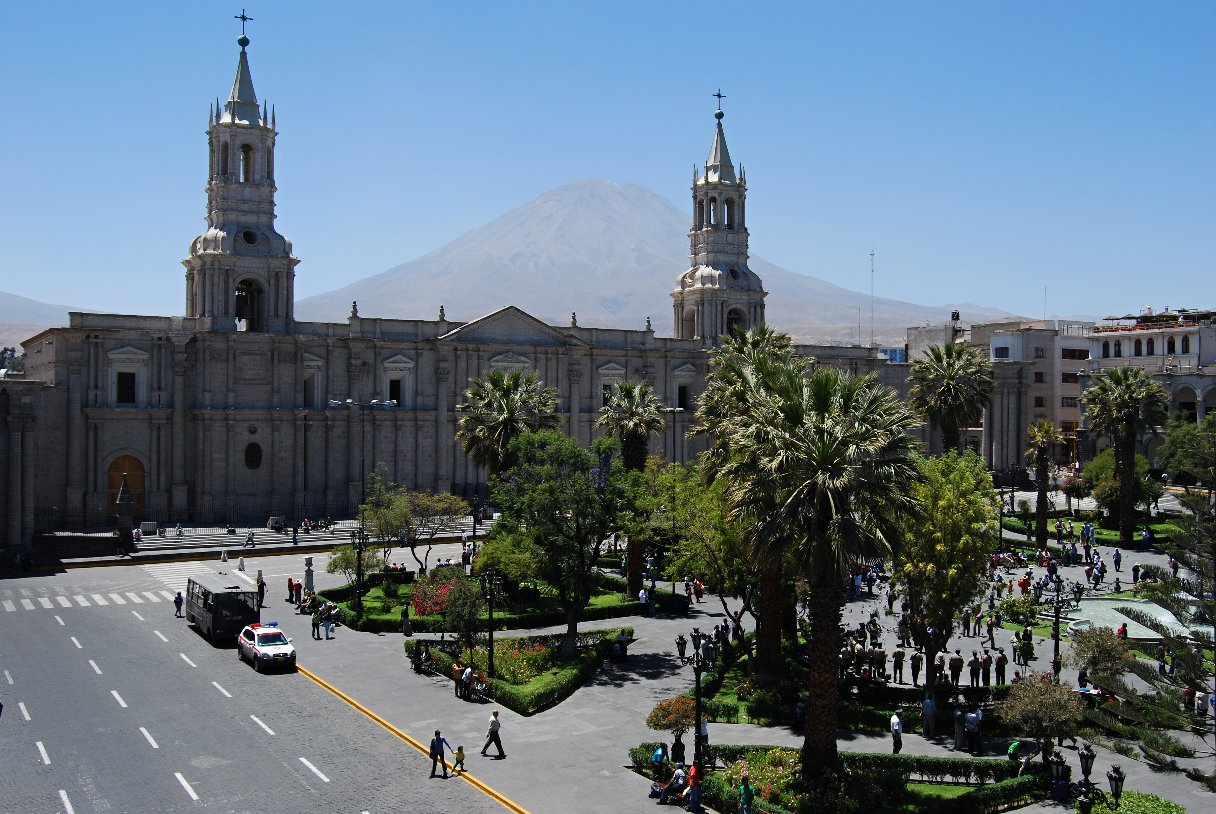 Arequipa - Plaza de Armas